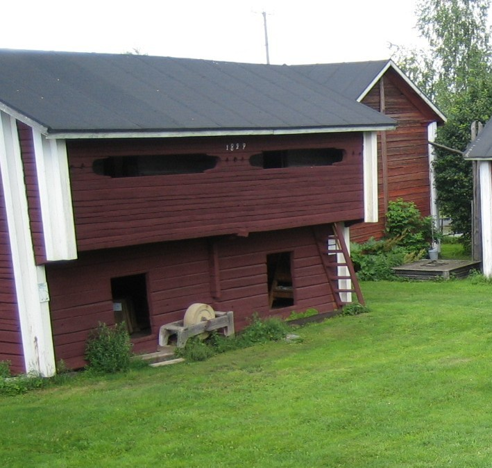 lutti